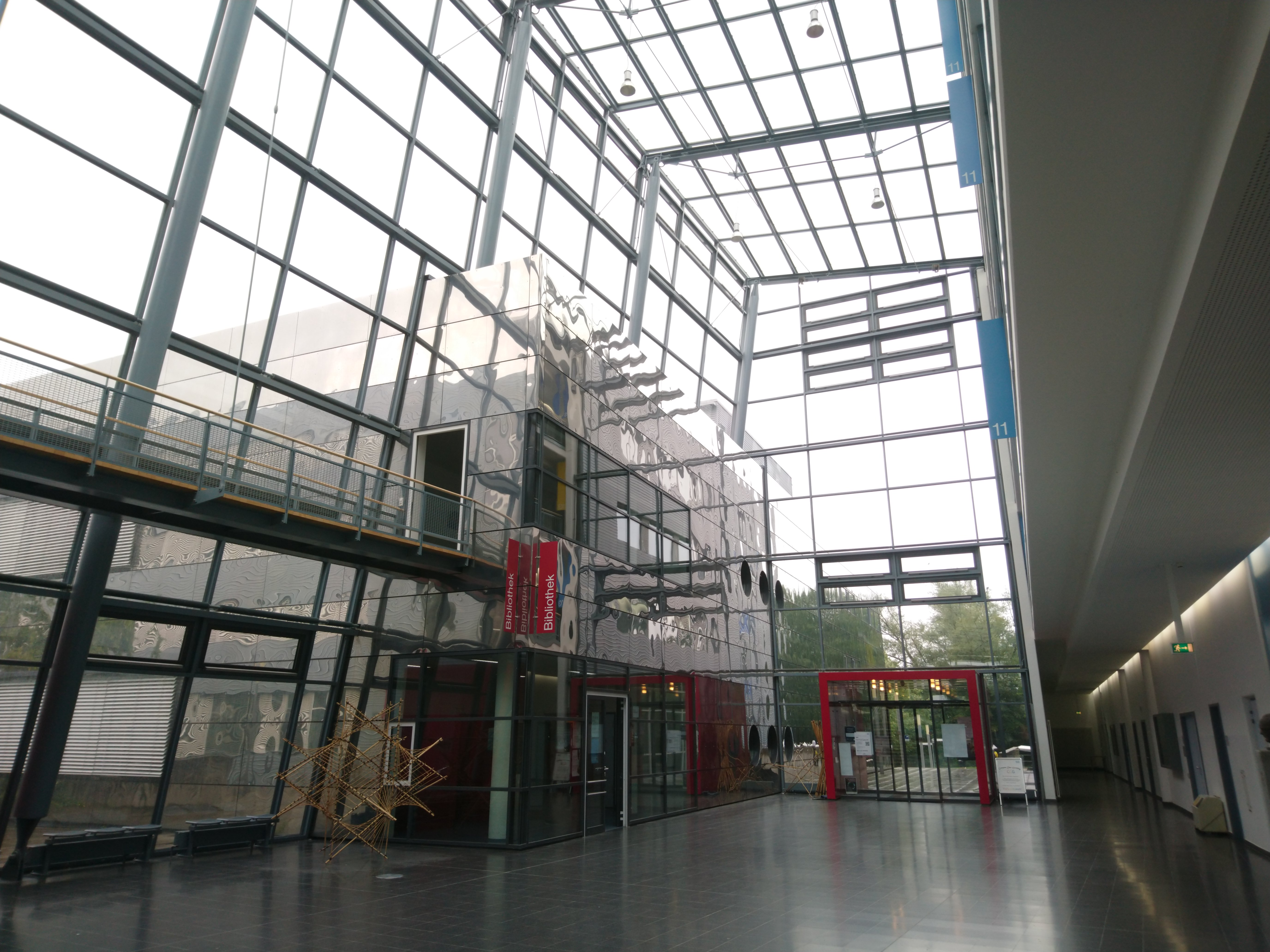 Foto der Bibliothek der Fakultäten Mathematik und Informatik